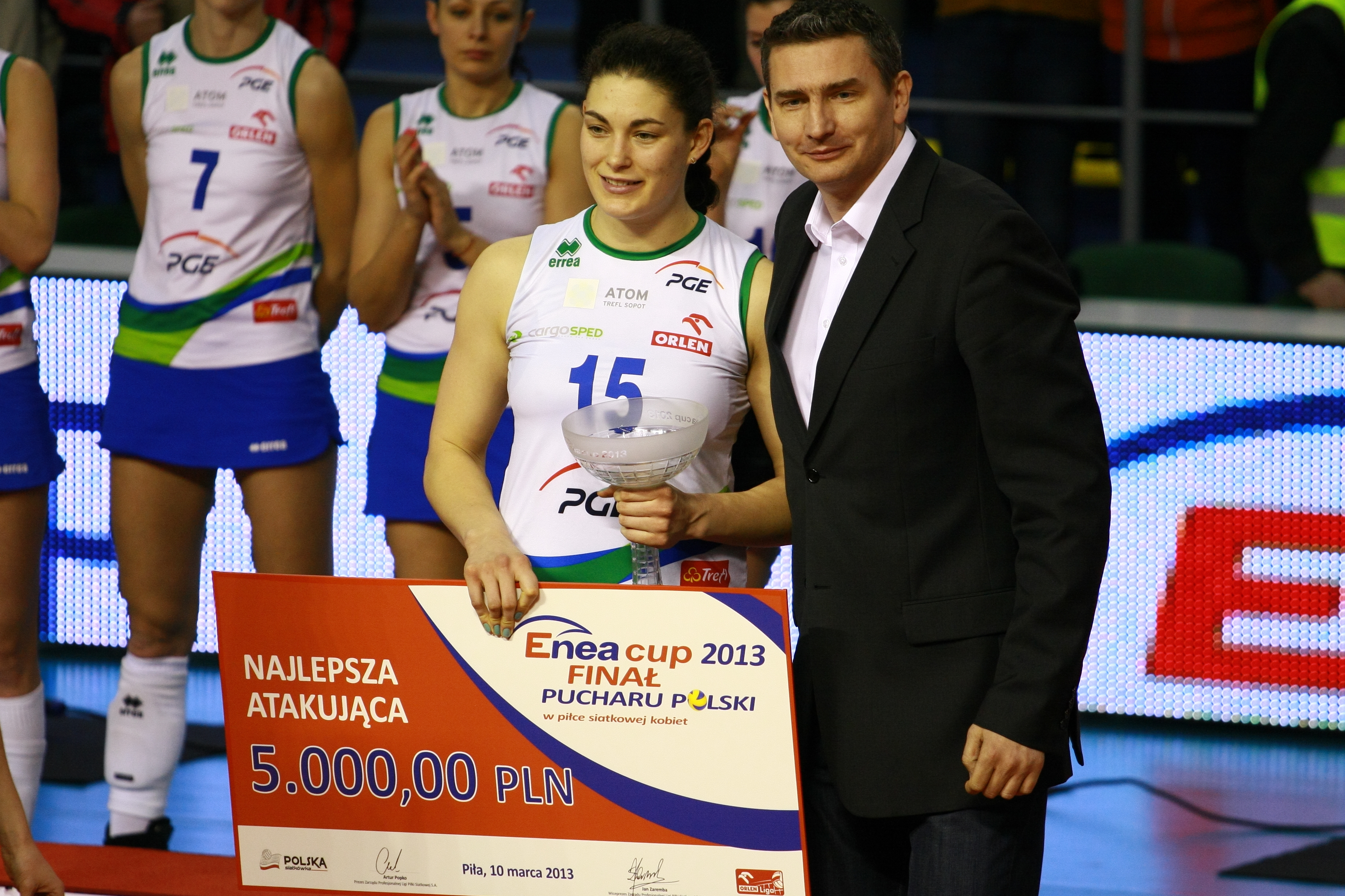 Atom Trefl Sopot Bank BPS Muszynianka Fakro Muszyna Tauron MKS Dąbrowa Górnicza Impel Gwardia Wrocław